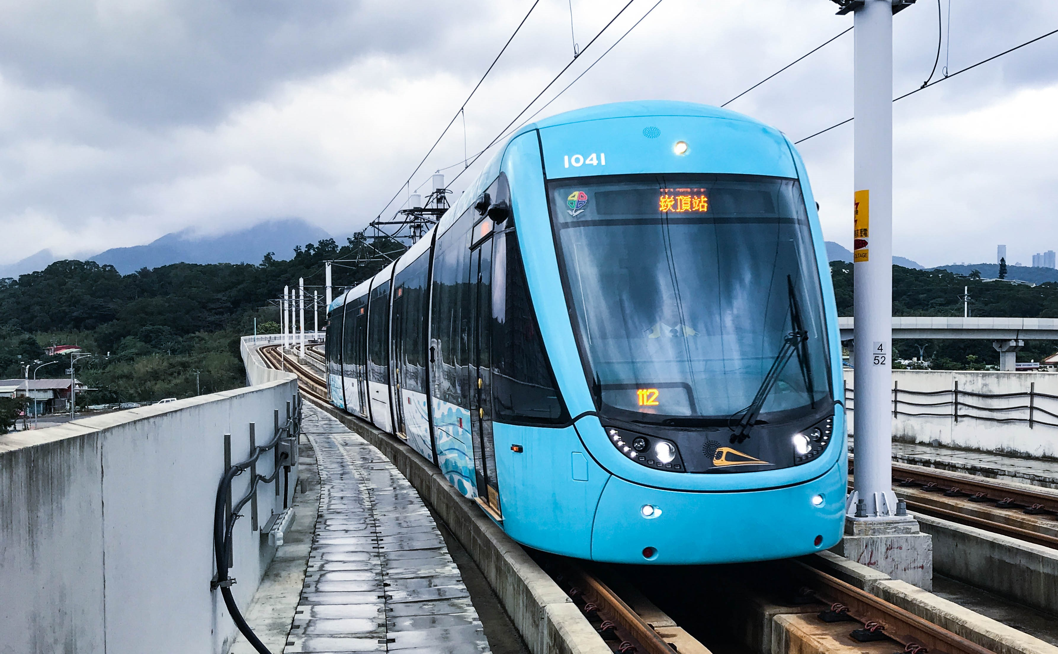 中文（台灣）: 新北捷運淡海輕軌綠山線電聯車於淡水行政中心站